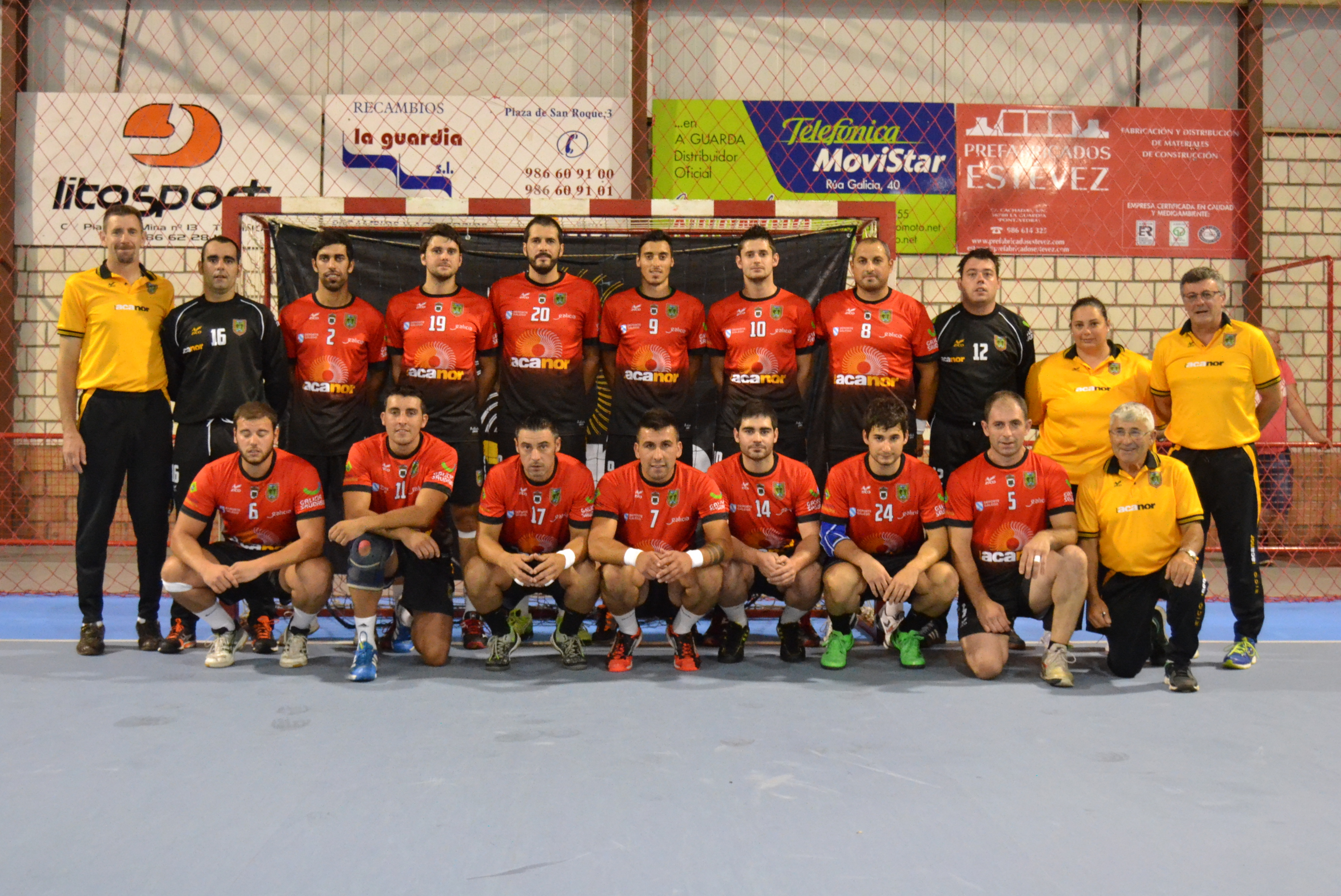 Atlético Novás no Torneo Concello do Rosal 2014